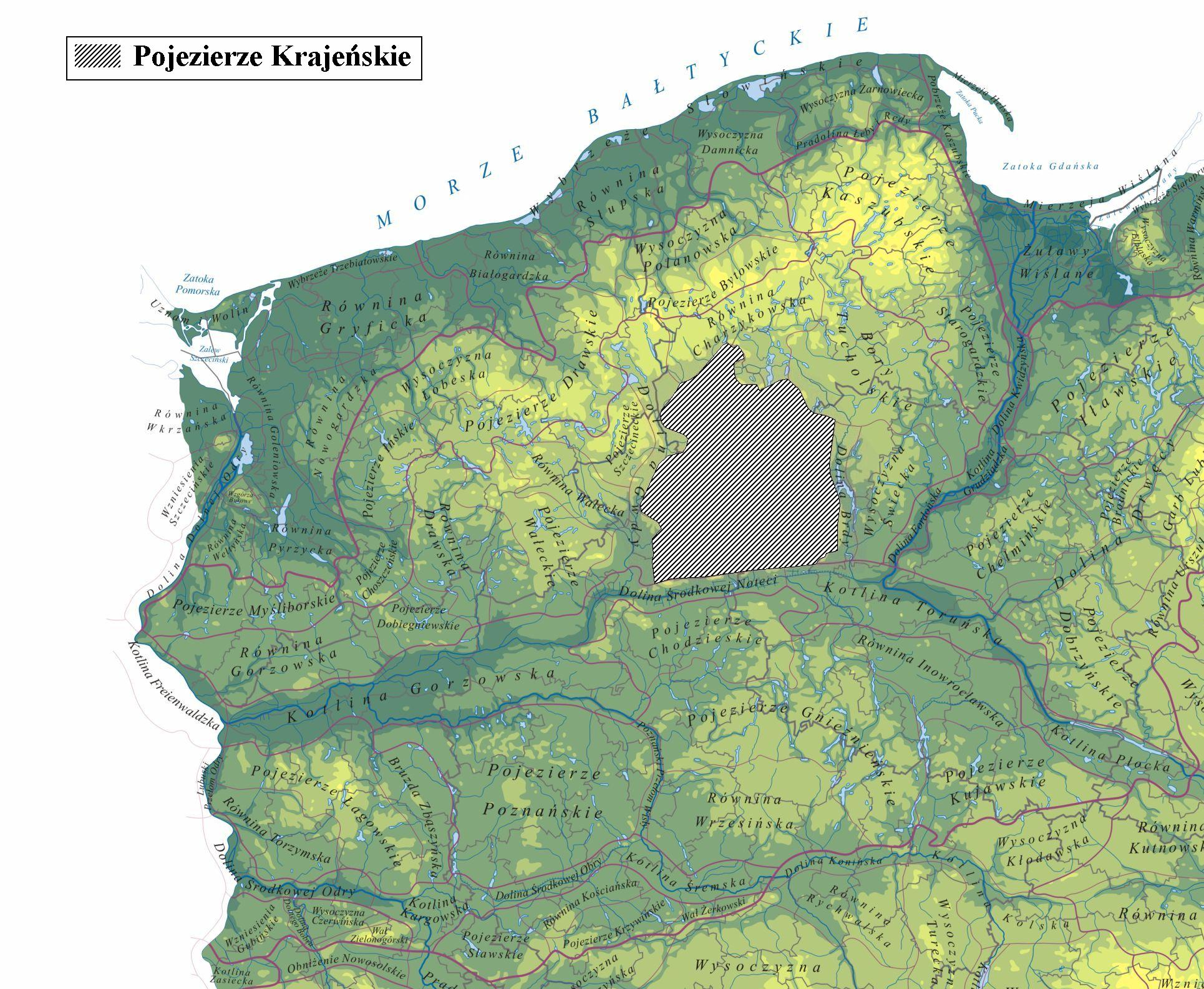 Pojezierze_Krajenskie